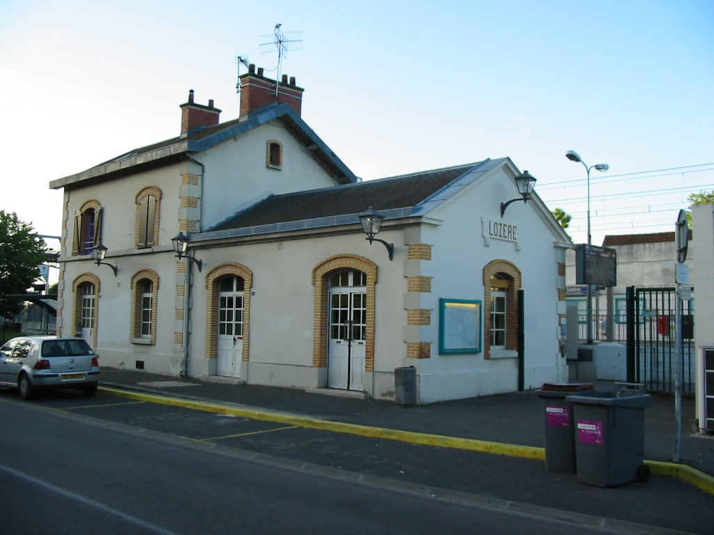 gare de Lozère, RER B, France